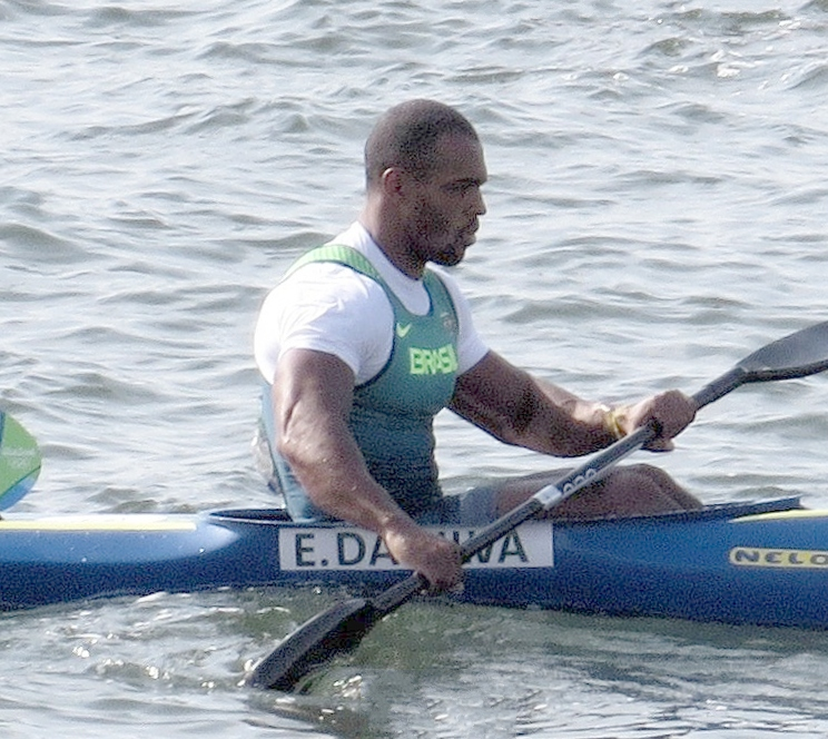 Rio 2016. Canoagem de velocidade.sx 06